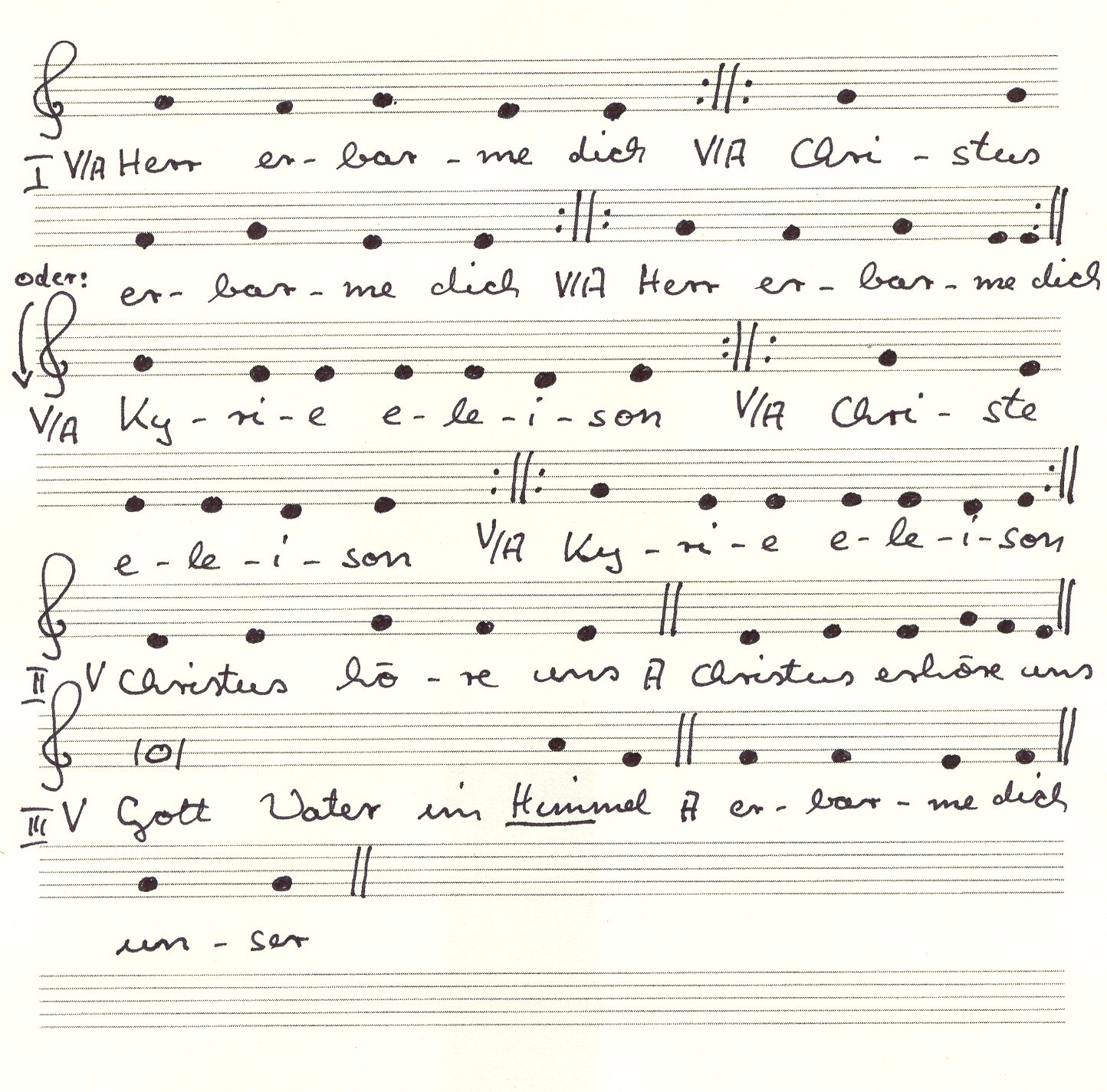 Melodie aus der Allerheiligenlitanei (Große Litanei) der röm.-kath. Kirche